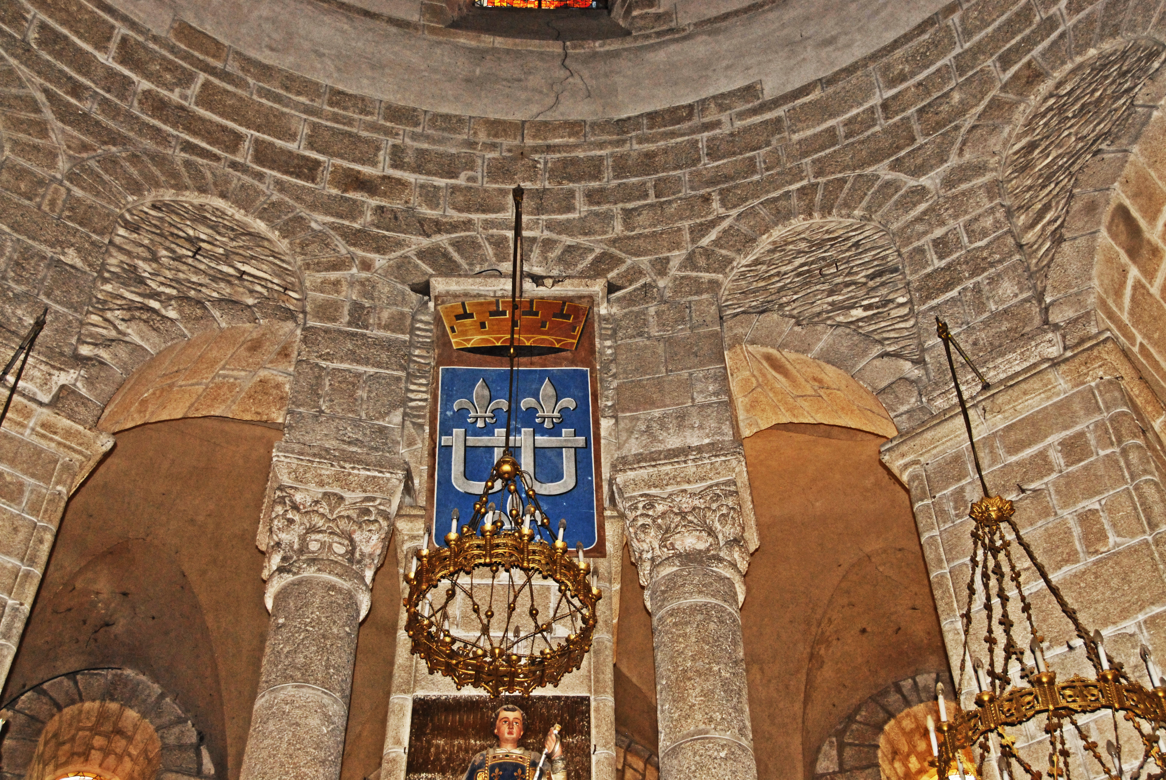 Stiftskirche St.-Léonard-de-Noblat, Chorarkaden teilvermauert